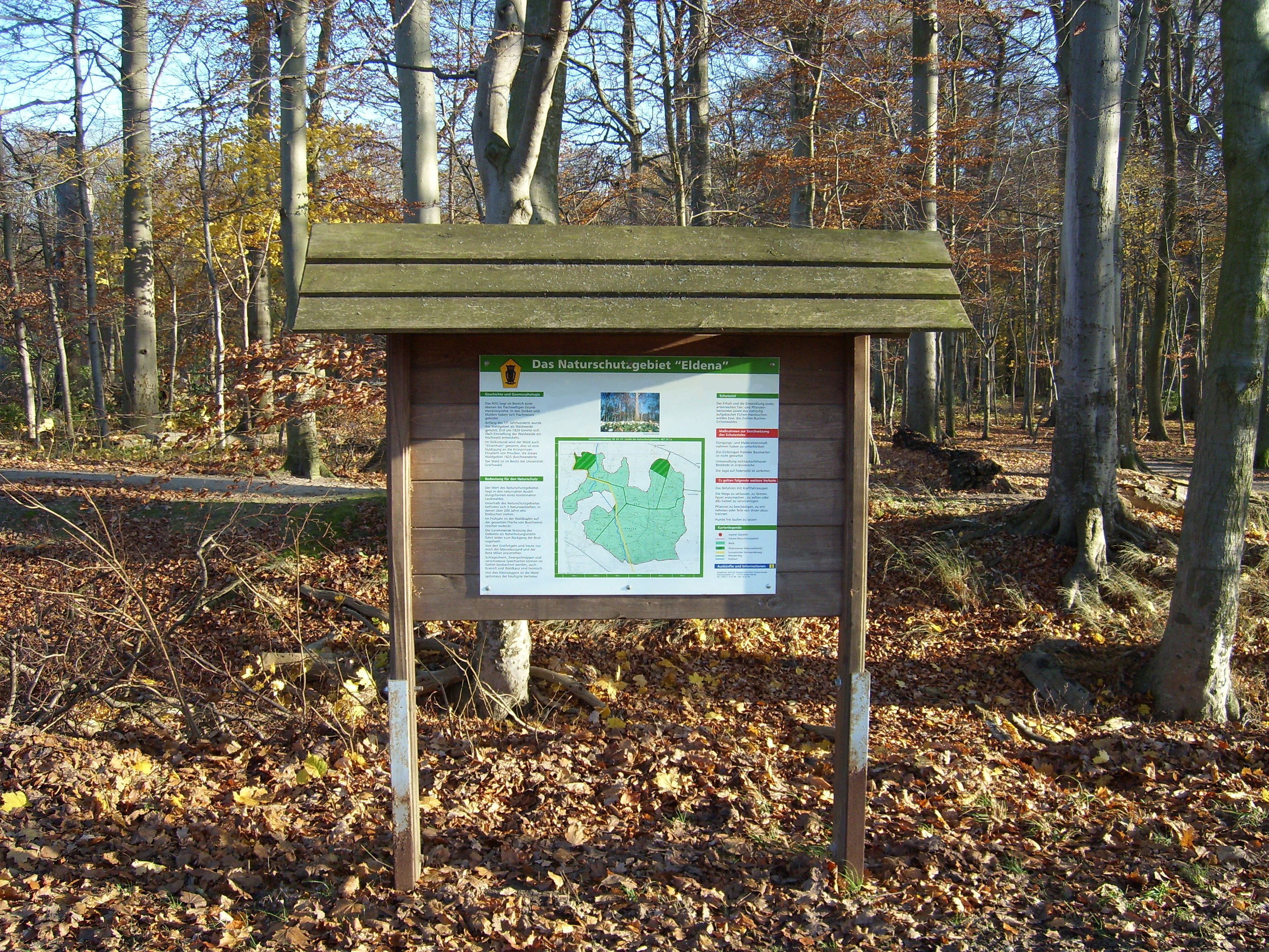 Informationstafel zum Greifswalder Naturschutzgebiet "Eldena" in der Hainstraße